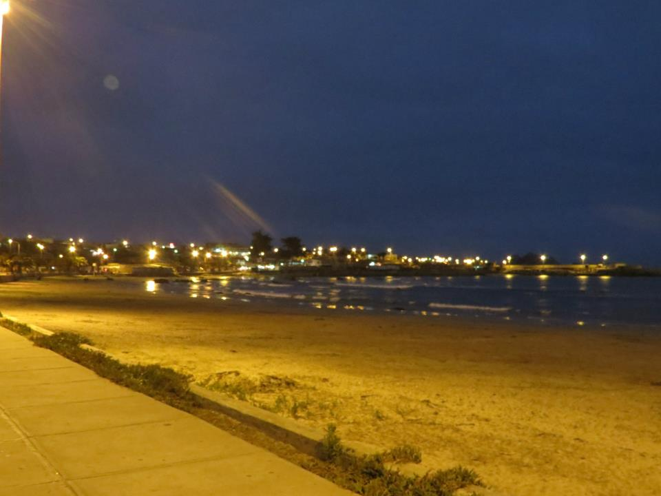 La Playa de Los Vilos de noche